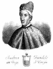 Andrea Dandolo (1306-1354), 54e Doge de Venise